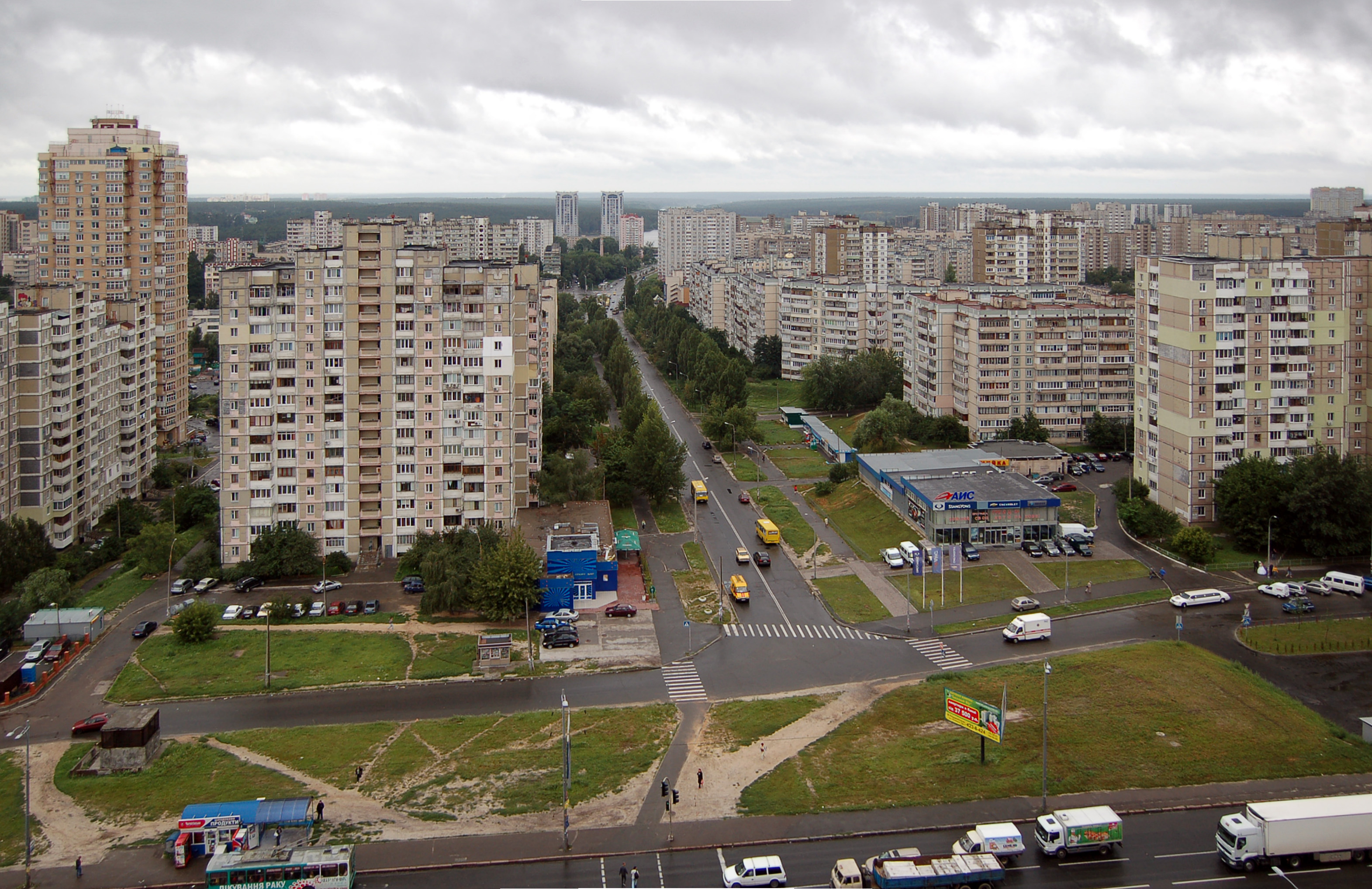 Ирпенская улица в Киеве